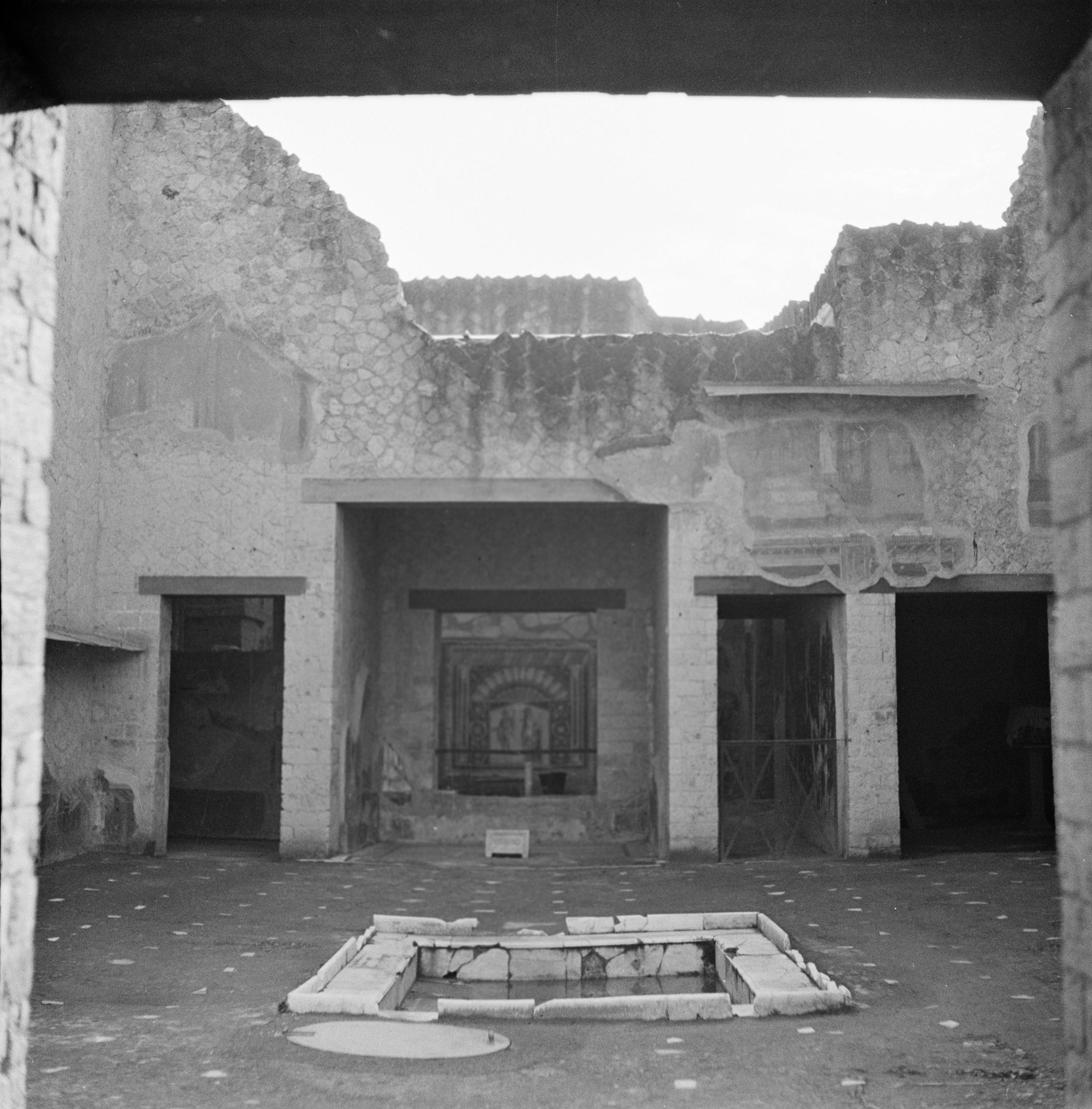 Collectie / Archief : Fotocollectie Van de Poll Reportage / Serie : Opgravingen in Pompeï Beschrijving : archeologie, opgravingen, ruïnes, Pompeï, Italië Datum : ongedateerd Locatie : Italië, Pompeï PAY ATTENTION ! This photograph shows a place in the ancient city of Herculaneum, not in Pompeii ! DenghiùComm (talk) 13:41, 28 April 2020 (UTC) Trefwoorden : archeologie, opgravingen, ruïnes Fotograaf : Poll, Willem van de Auteursrechthebbende : Nationaal Archief Materiaalsoort : Negatief (zwart/wit) Nummer archiefinventaris : bekijk toegang 2.24.14.02 Bestanddeelnummer : 255-8857